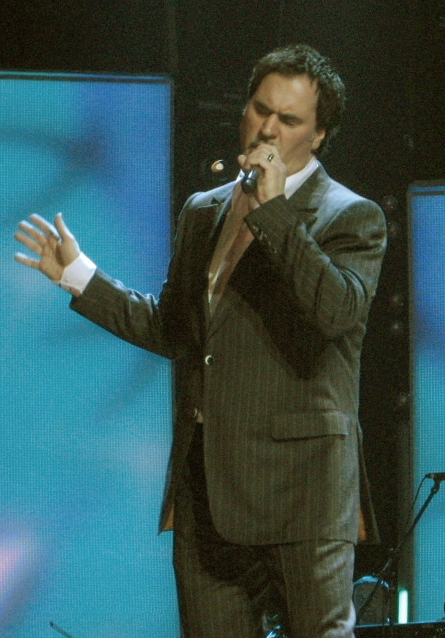 фото Валерия Меладзе на концерте в "Олимпийском", 2008 г.